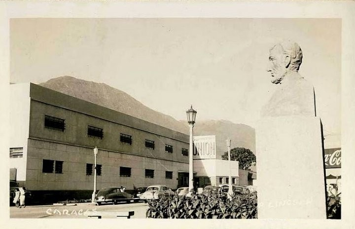 Plaza Lincoln (Colinas Bello Monte) en Caracas - Venezuela (1950)